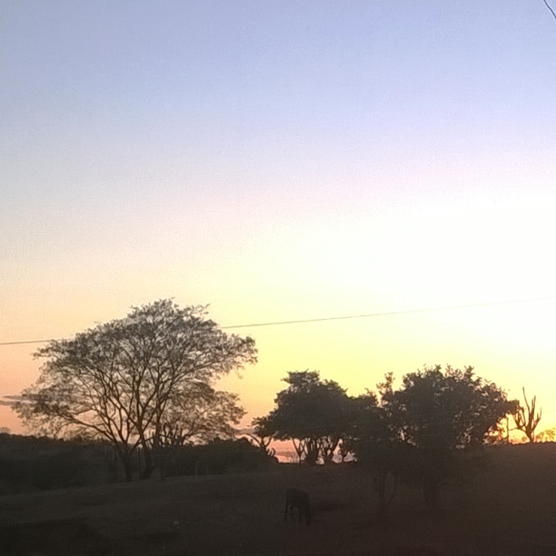 Quixelô, Ceará. Sitio Faé, final de tarde.